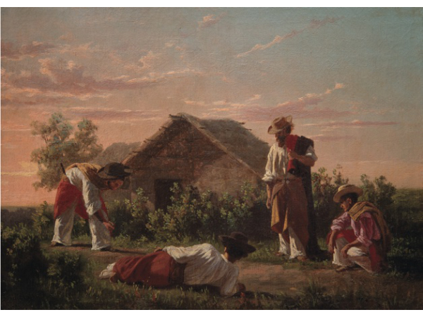 "La taba" del pintor de Uruguay Juan Manuel Blanes (1830 - 1901).